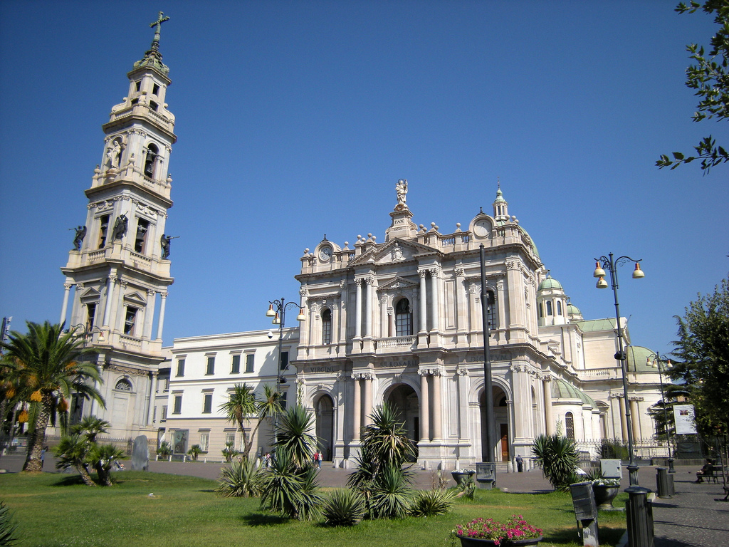 Basílica de Nossa Senhora do Rosário de Pompéia.